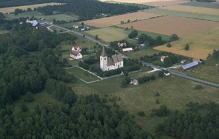 Motiv: Vallstena kyrka Nyckelord: Flygbilder, Riksintressen Kategori: KyrkbyVallstena kyrka